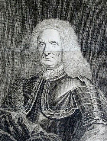 Benoît de Maillet from "Description de l'Égypte, contenant plusieurs remarques curieuses sur la Geographie ancienne et moderne de ce pais...." Paris, 1735.